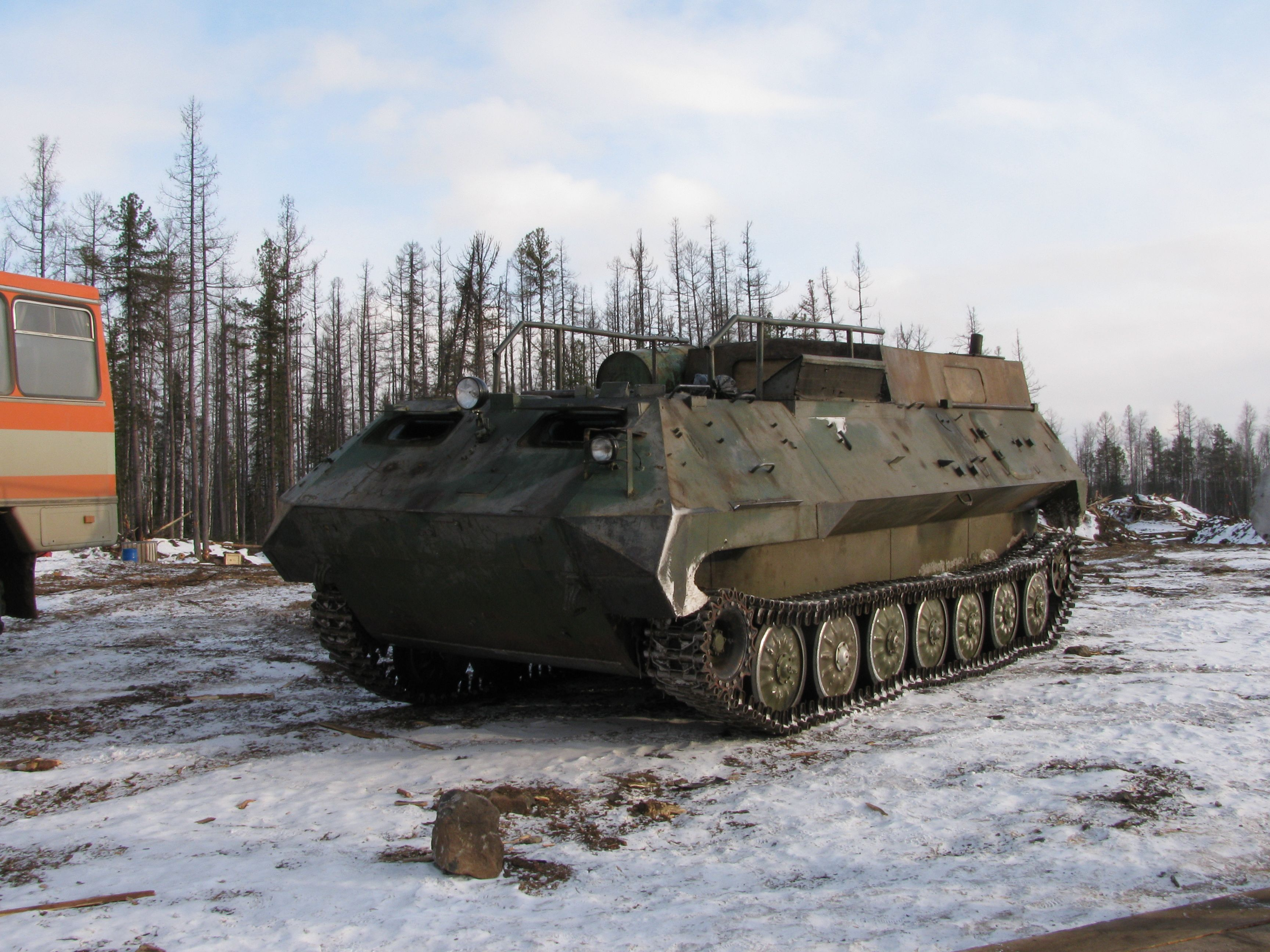 МТ-ЛБу - малый тягач, легко бронированный. Тоже одно из тамошних средств передвижения.